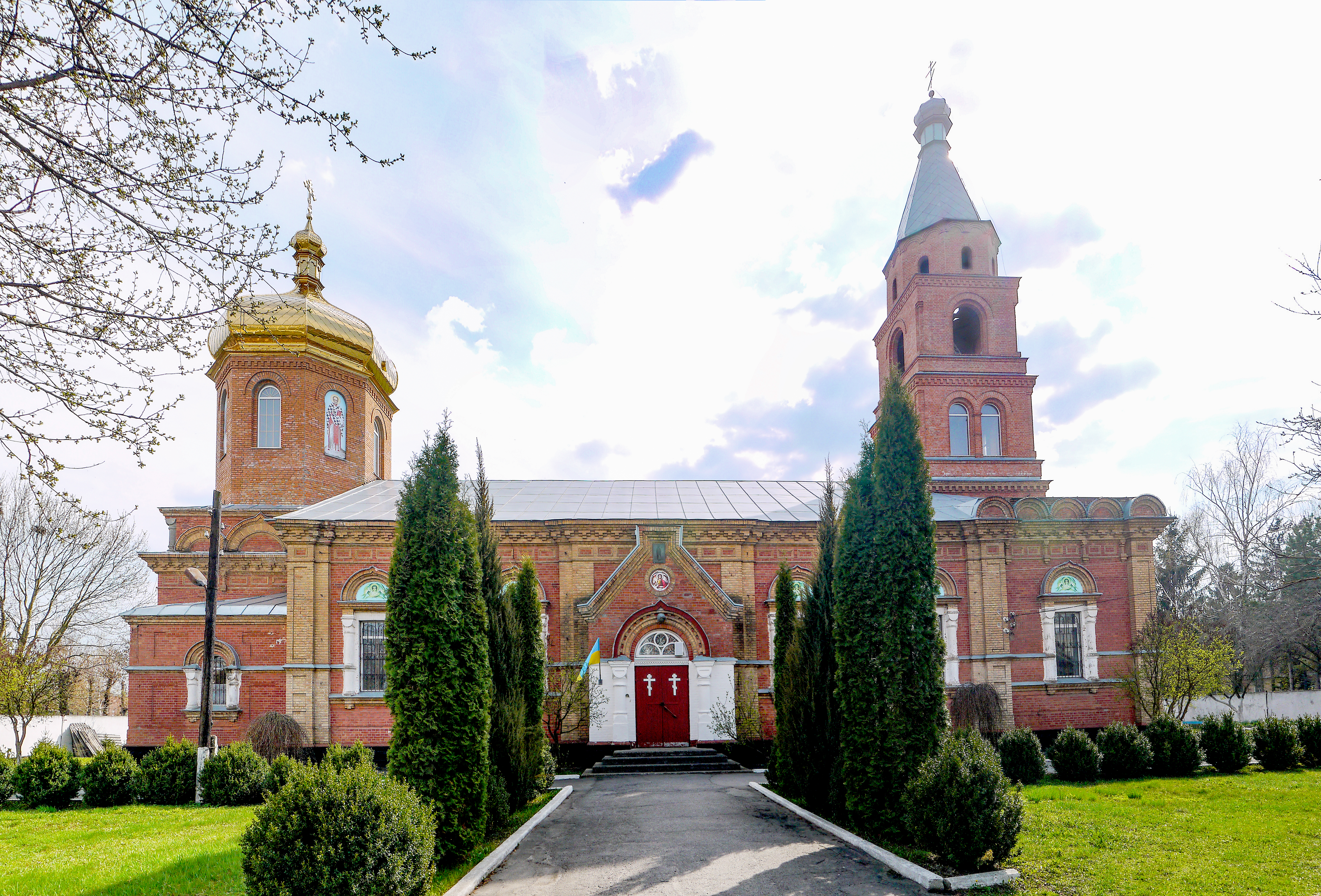 Андріївська церква, Старокостянтинів, вул. Миру